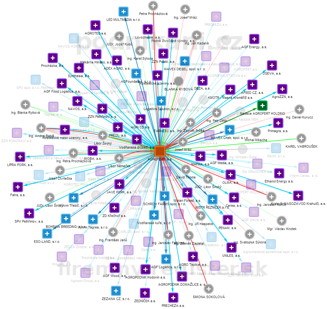 Agrofert, a.s., grafické znázornění vztahů firem v holdingu